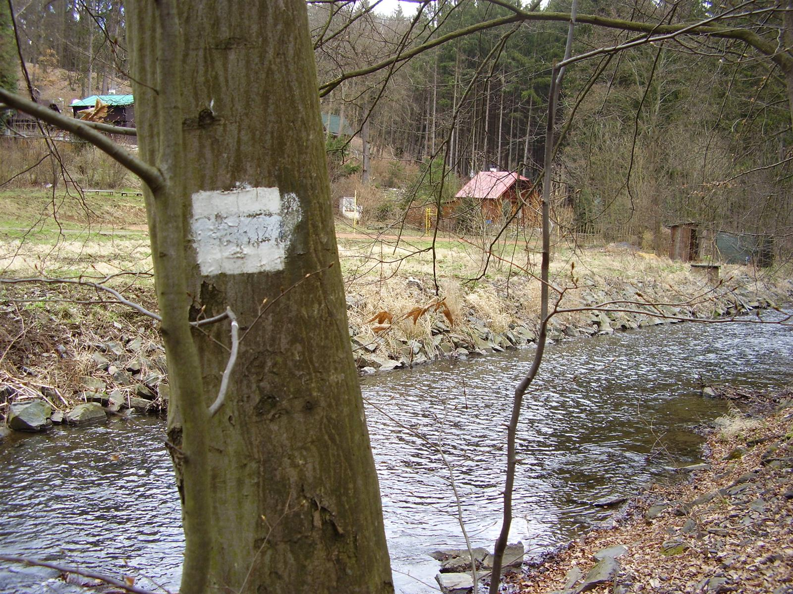 Bíle zamalovaná modrá turistická značka, v úseku mezi rozcestími "Pod Masečínem" a "Údolí Kocáby" ve Středních Čechách, řeka Kocába, za řekou zřejmě chata Masečín če. 658, vzdálenější chaty patří již ke Slapům.